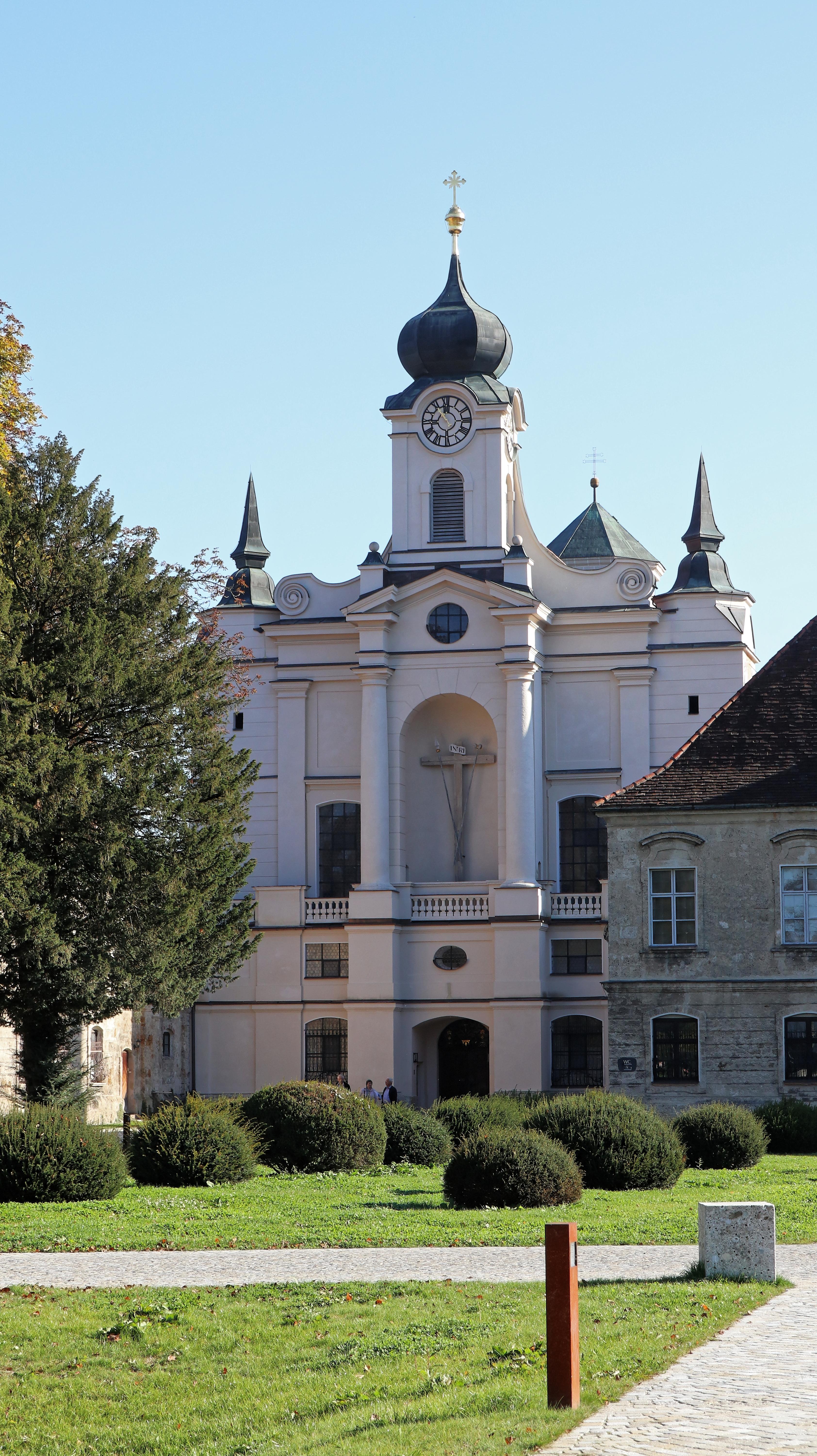 Aussenansichten von Kloster Raitenhaslach, Die Klosterkirche Raitenhaslach und der 1762 fertiggestellte Prälatenstock, heute Sitz des Akademiezentrums der TUM. This is a photograph of an architectural monument.